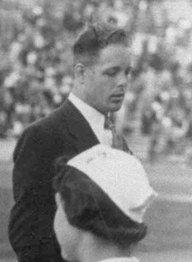 Einar Karlsson